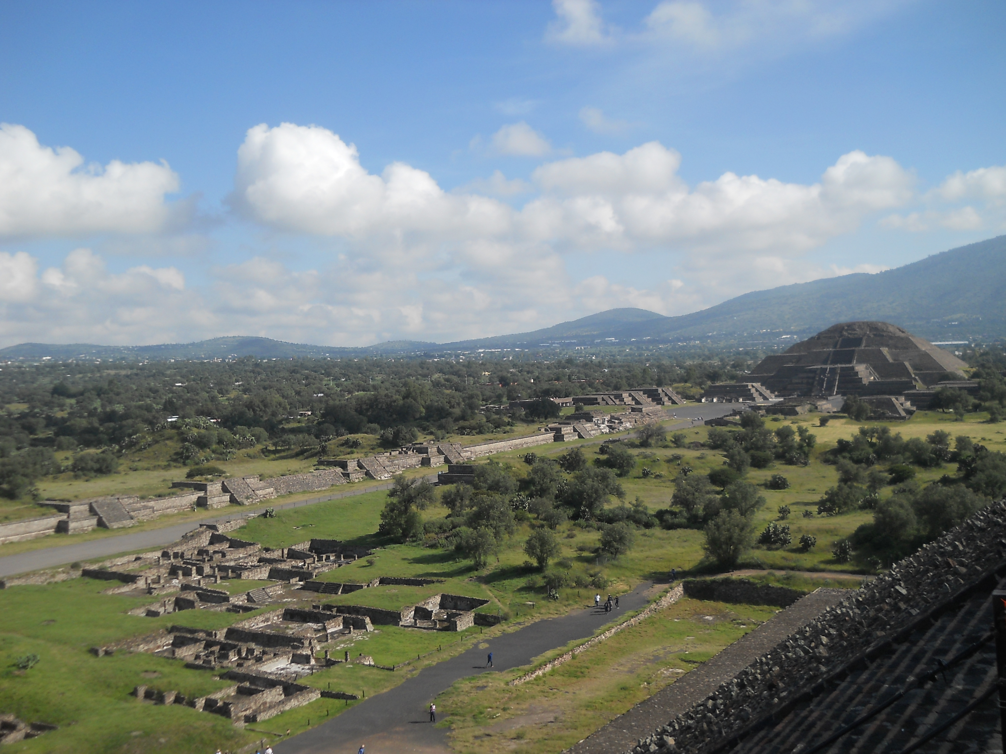 Sito archeologico di Teotihuacán, Messico. Visa del Viale dei Morti dalla cima della Piramide del Sole. In fondo si nota la piramide della Luna